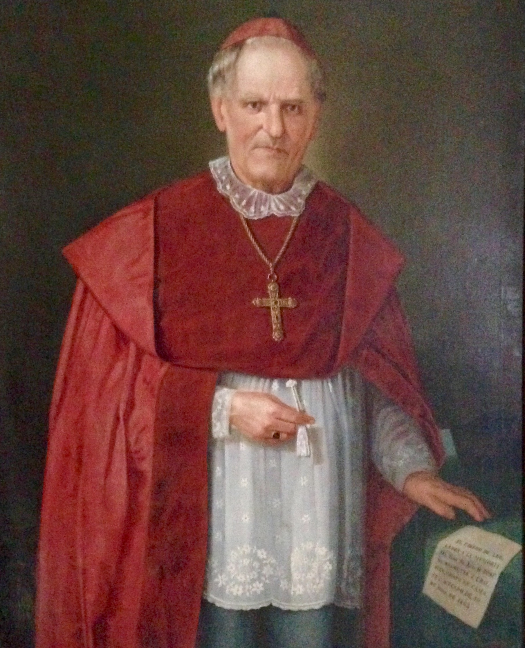 Retrato del Arzobispo de Guatemala Francisco de Paula García Peláez